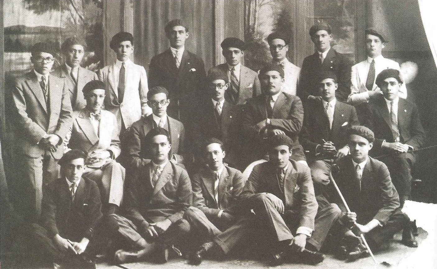 Generación del 28, grupo que encabezó las revueltas estudiantiles en febrero de 1928.